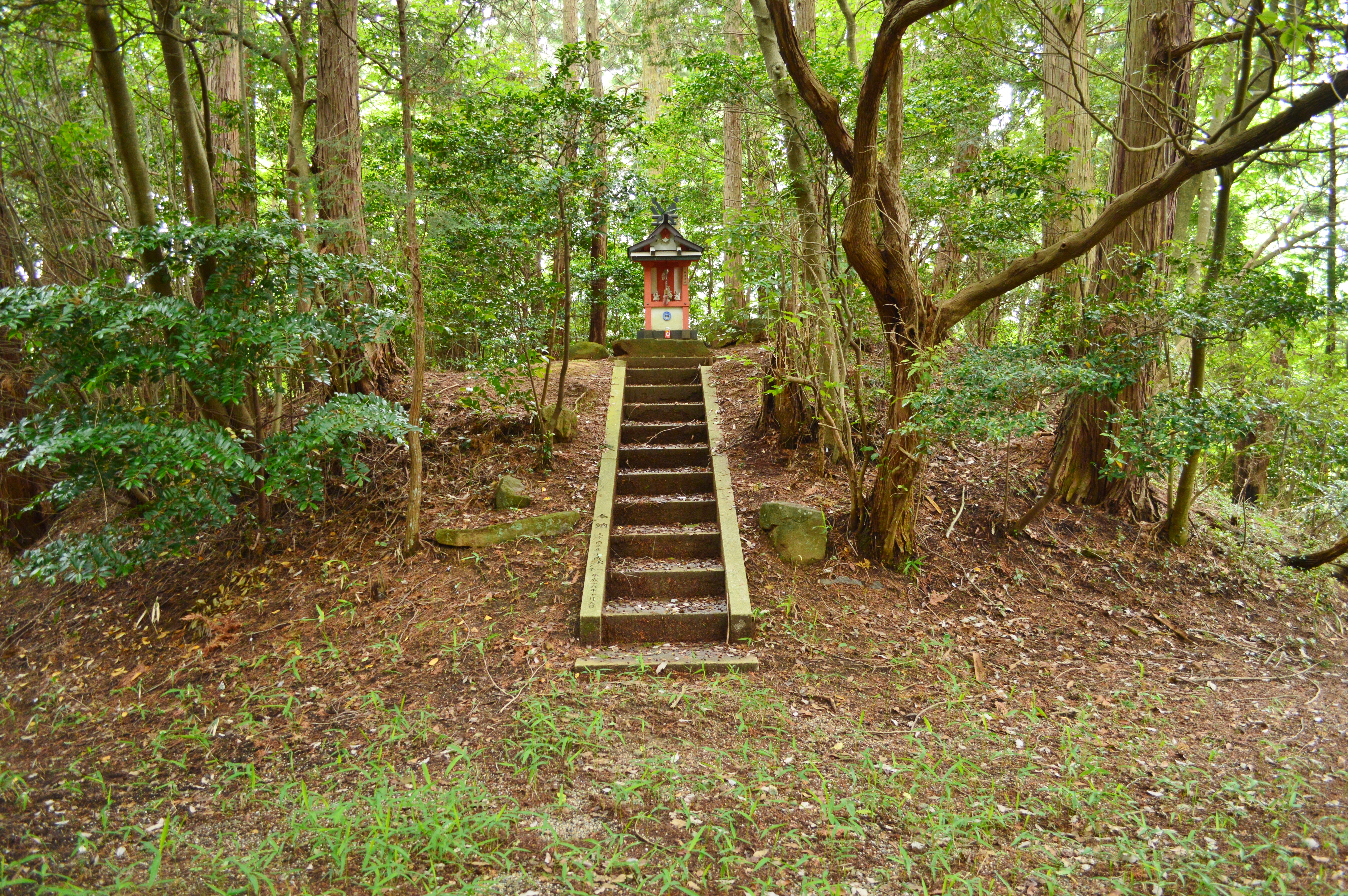 三陵墓南古墳 墳丘